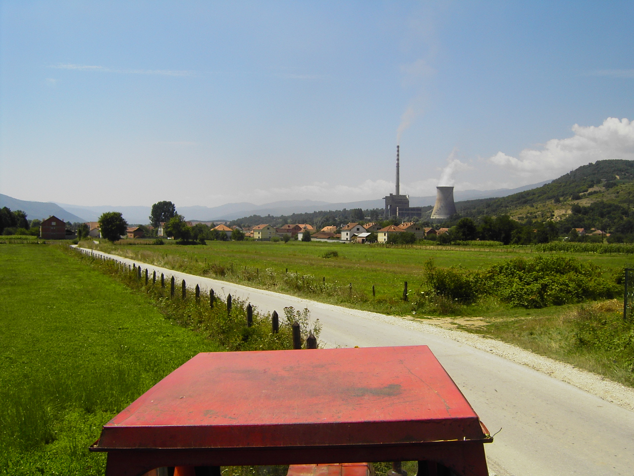 Поглед на село Жубрино, кичевско